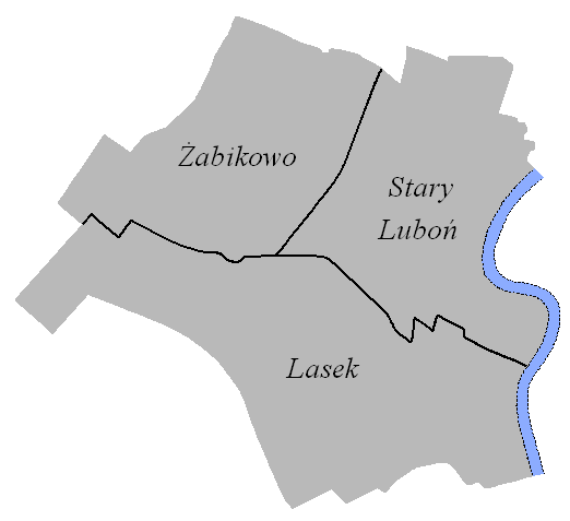 Luboń - plan